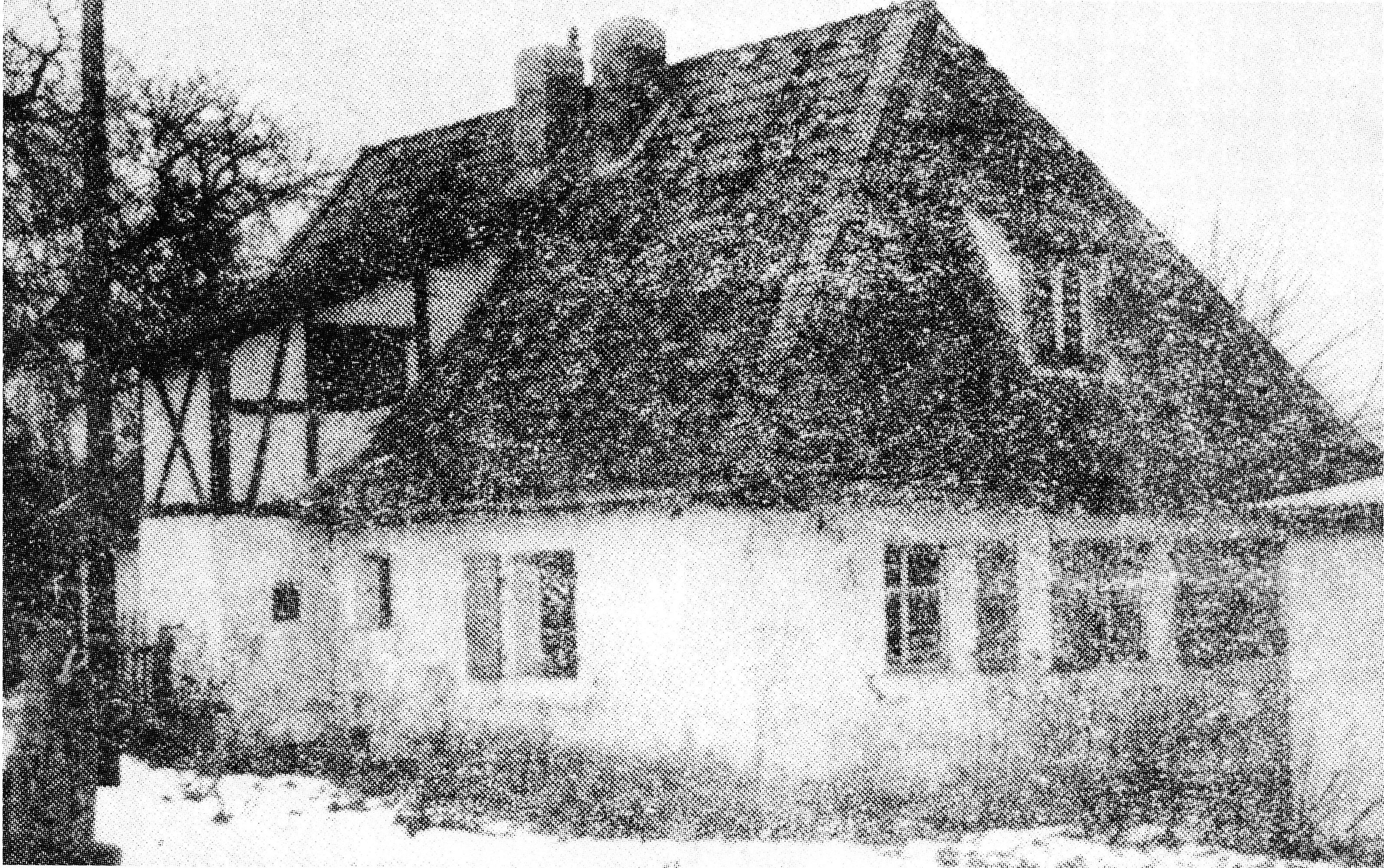 Das Alte Schulhaus in Ebneth um 1900 (Erbaut 1807, verwendet bis 1913).